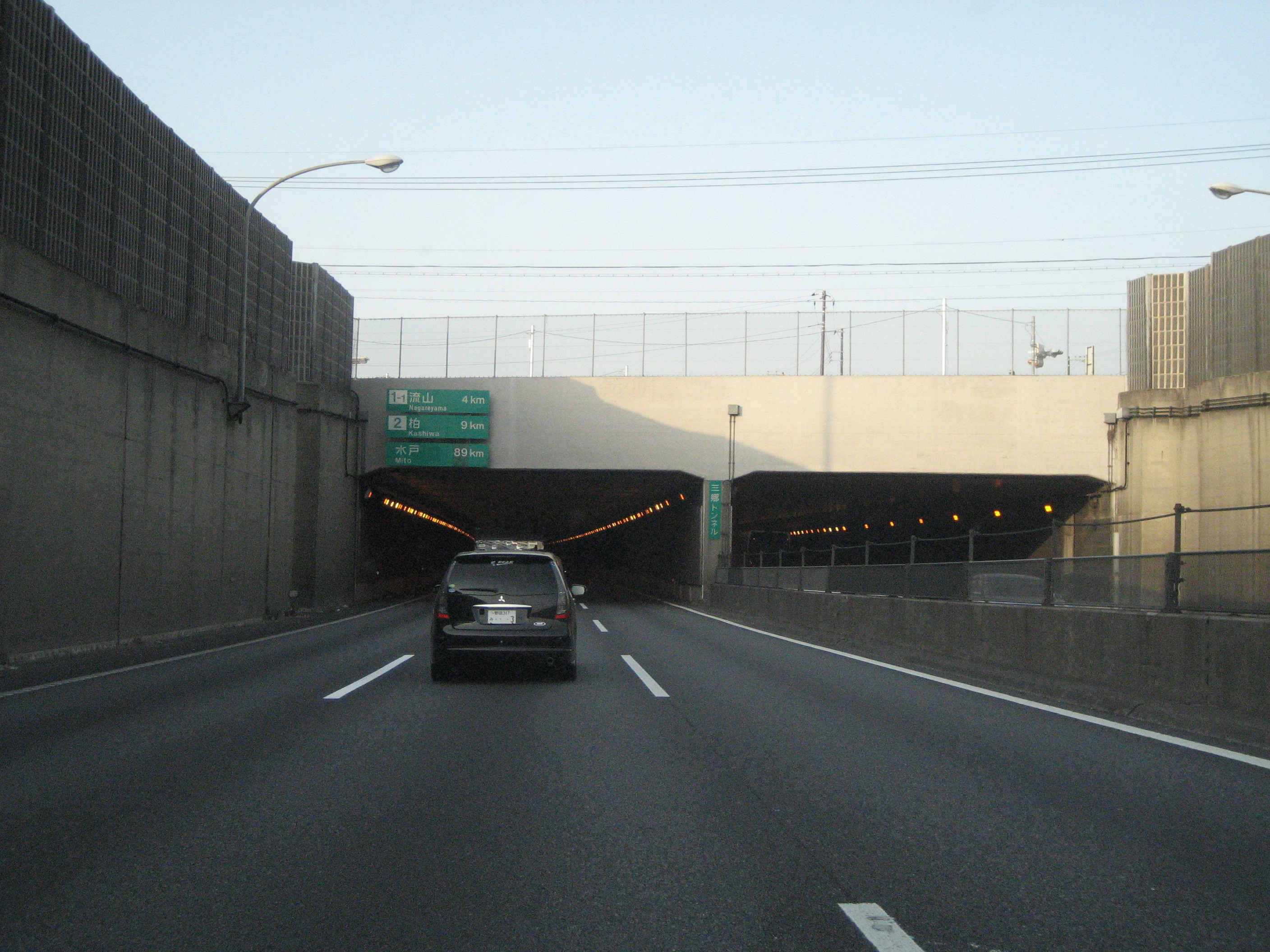 常磐自動車道三郷トンネル